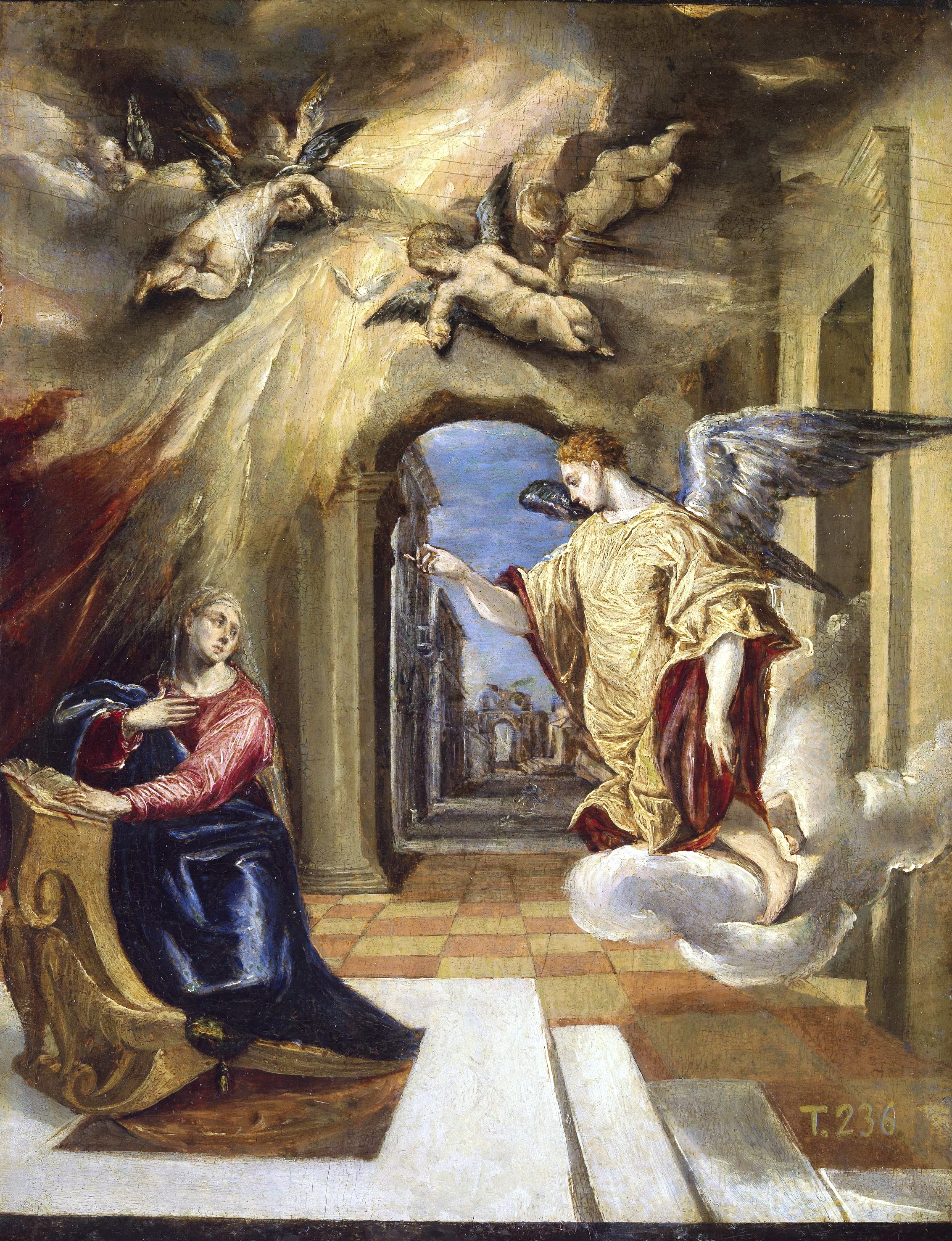 La obra representa el momento en que el Arcángel San Gabriel anunció a la Virgen María que sería la madre de Jesucristo, el Mesías.